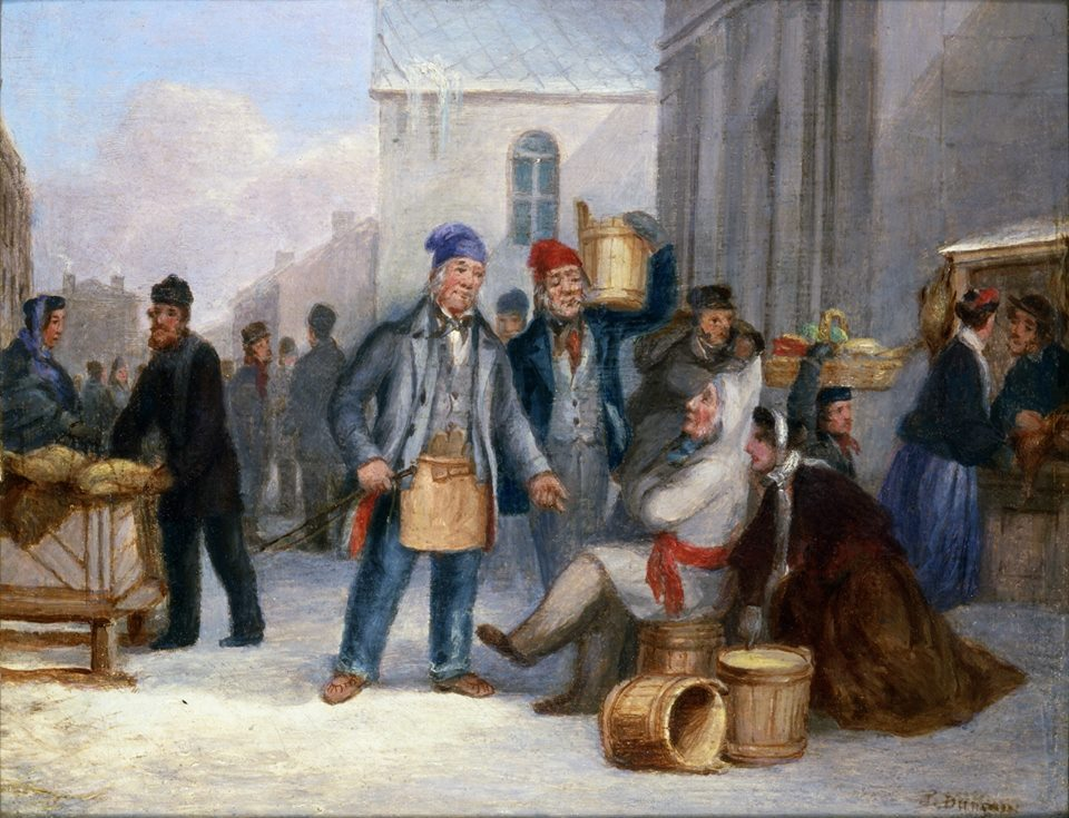 Bonsecours Market Scene in Winterlabel QS:Len,"Bonsecours Market Scene in Winter"label QS:Lfr,"Marché Bonsecours, scène d'hiver"